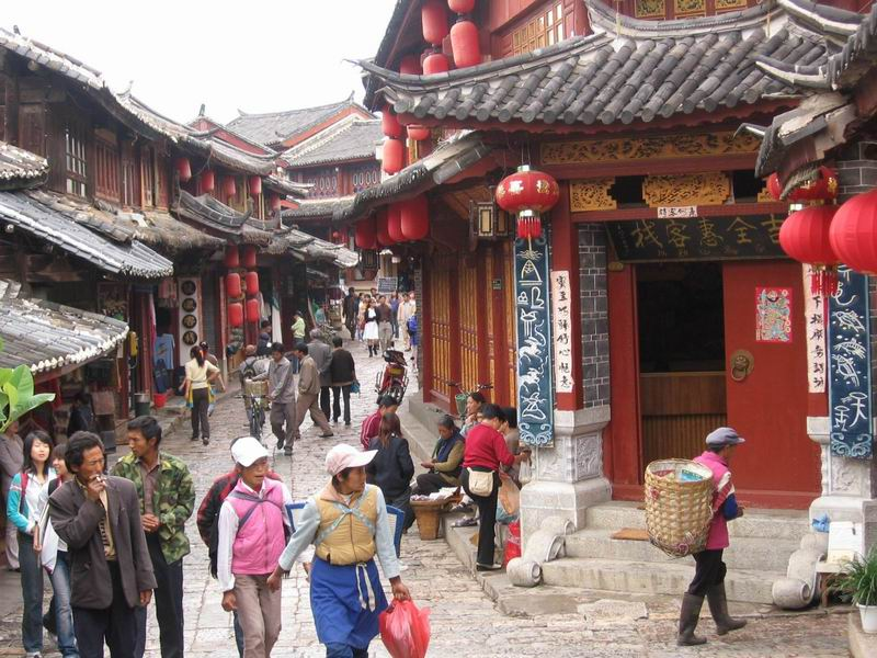 Lijiang, Yunnan, China. Taken by Ariel Steiner.